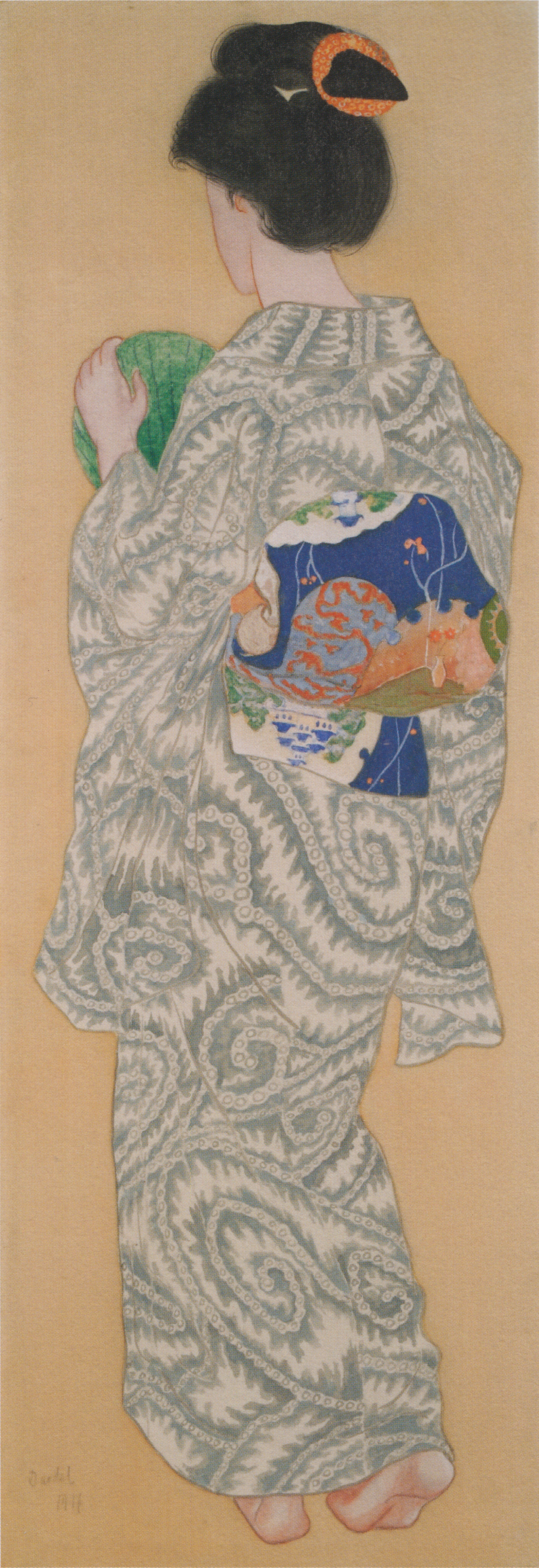 Nils Dardel Japanska (med rygg mot betraktaren),1917, blandteknik på sidan, 119,5 x 42 cm Åmells Konsthandel